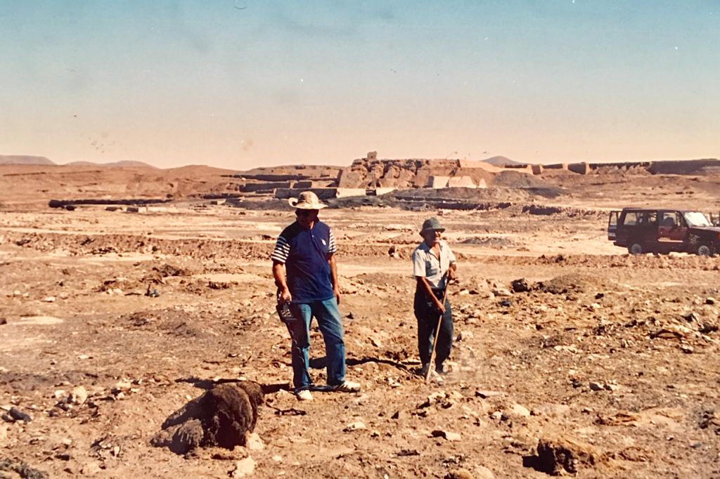 Mario Díaz desmarcando una superficie en la ex oficina salitrera Jazpampa al norte de Iquique en 1992